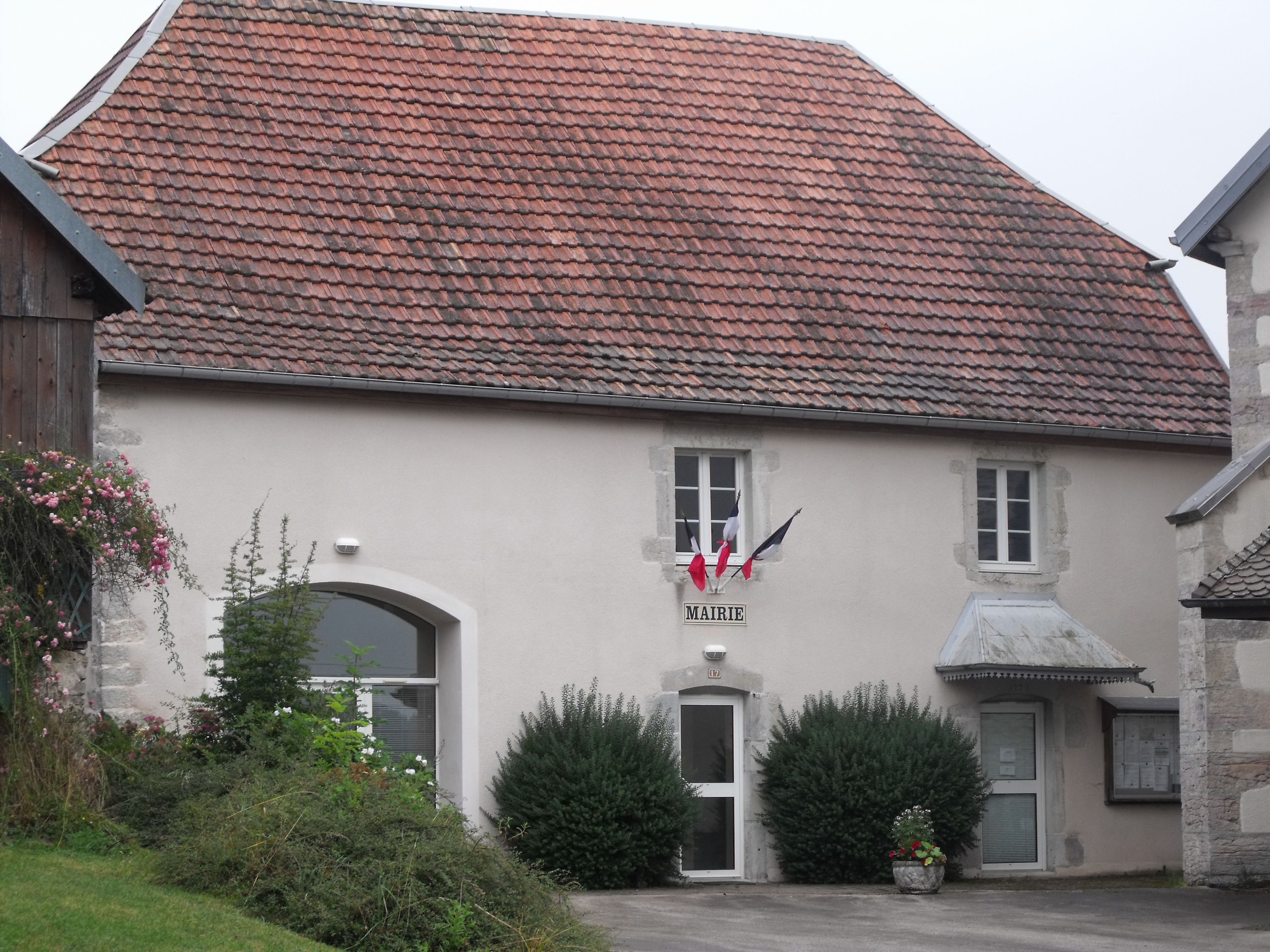 Mairie de La Grange, Doubs, France